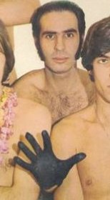 Foto de Carlos Bisso, del Grupo argentino Carlos Bisso y su Conexión Nº 5